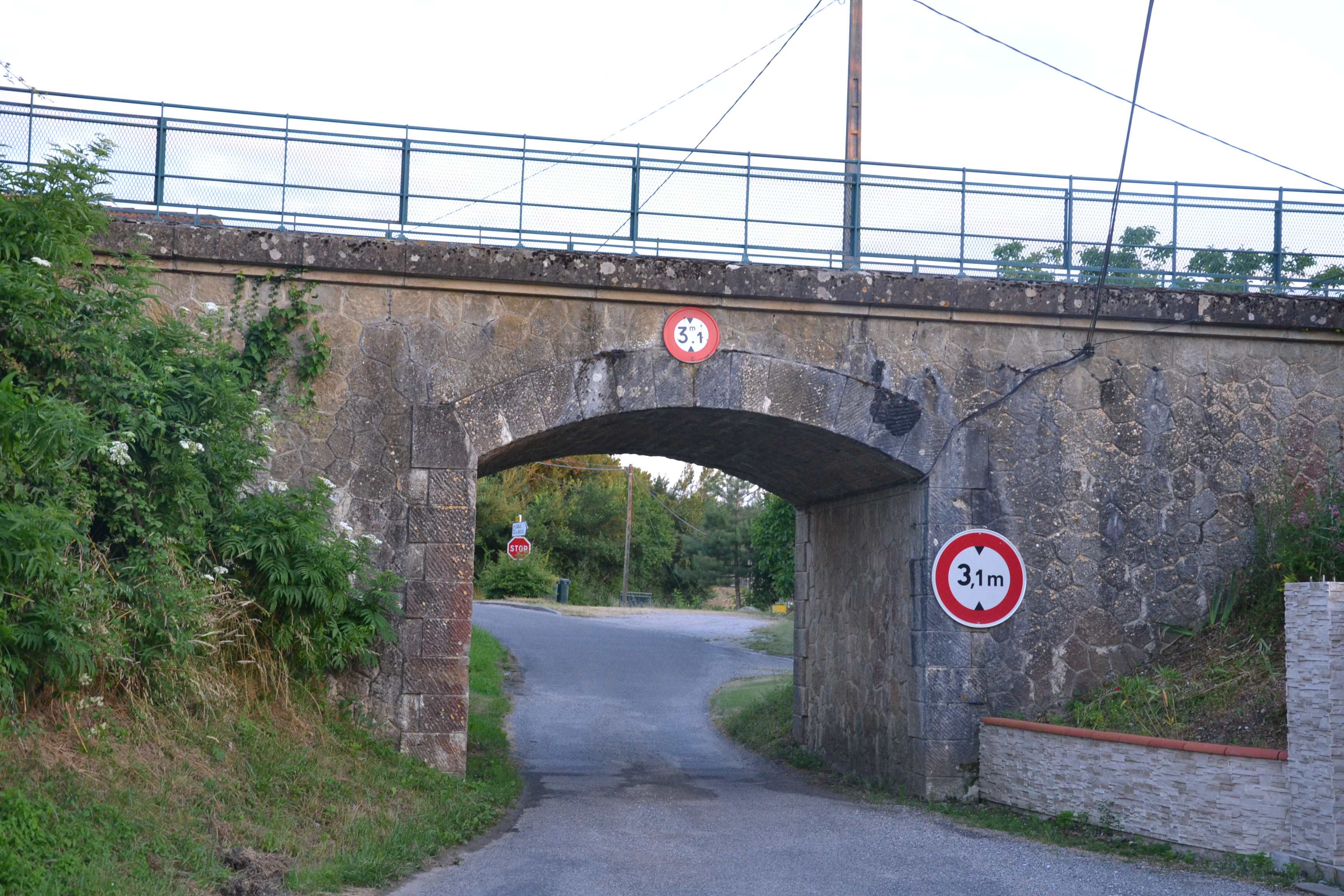 Ancien pont ferroviaire de la ligne de Pamiers à Limoux à Moulin-Neuf, au-dessus de la RD106 (Ariège, France).